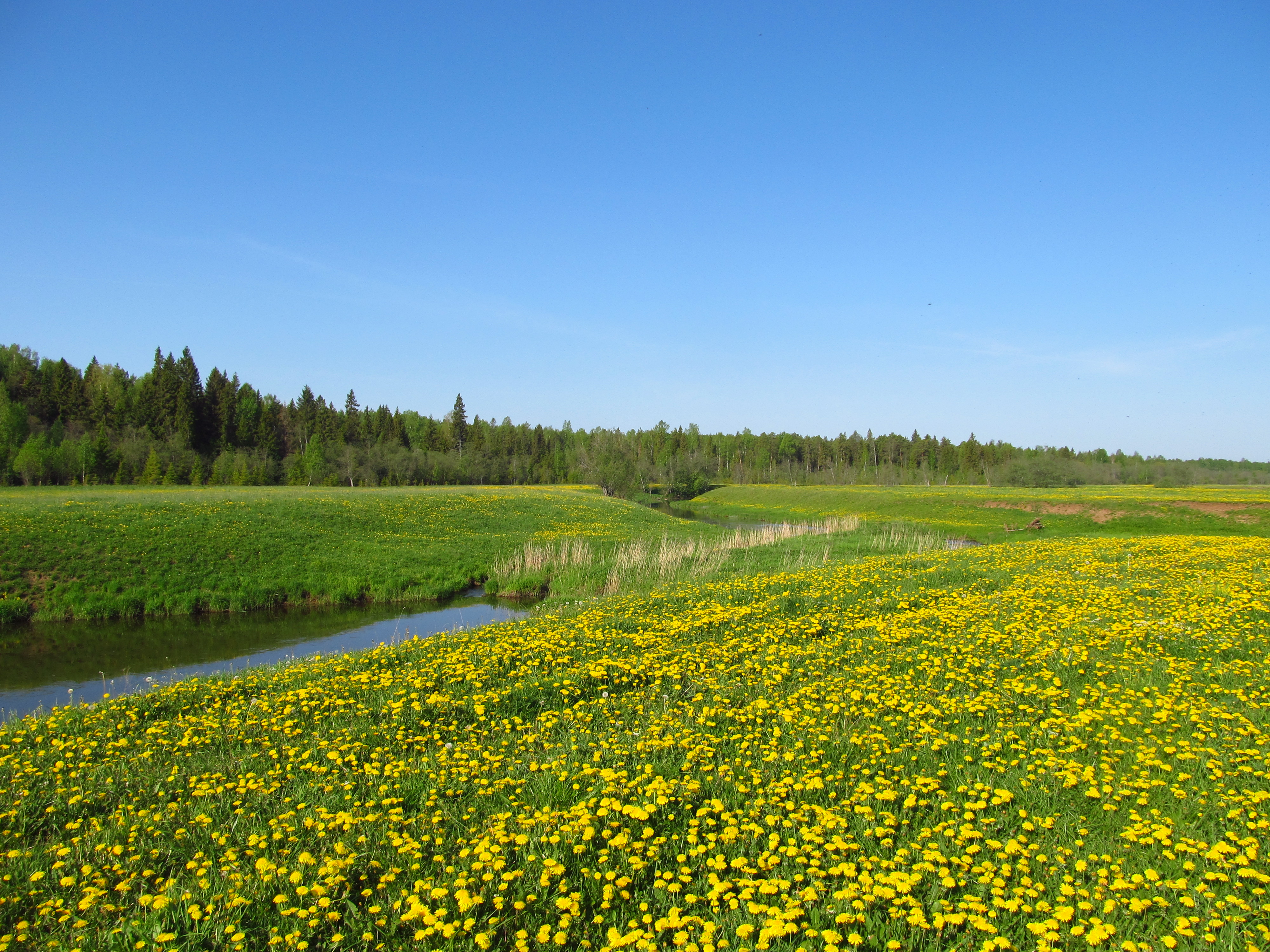 Пойма реки Быстрицы, место рекреации: Д. Шмелиха до оз. Кырмыш в пределах водоохранной зоны,Кумёнский район, Кировская область This image is related to the protected area of Russia number 4310107